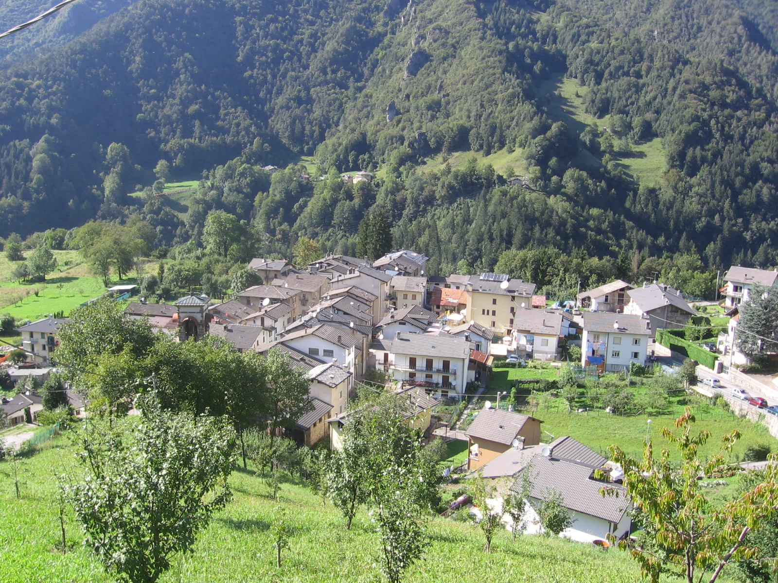 Piazzolo, Bergamo, Italy